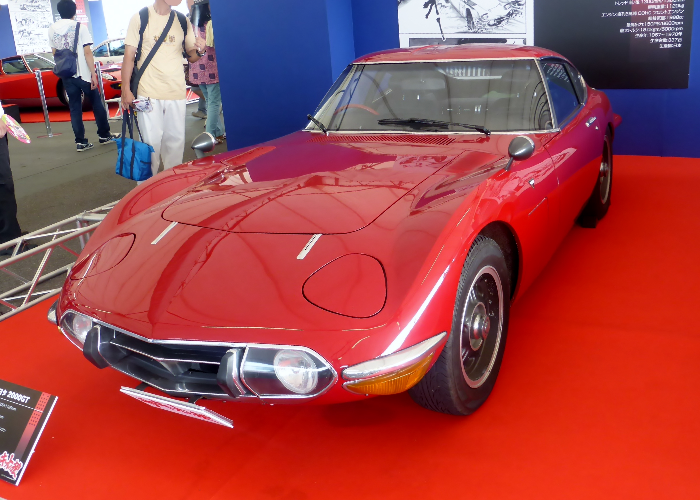 「サーキットの狼」仕様のトヨタ・2000GTを撮影。